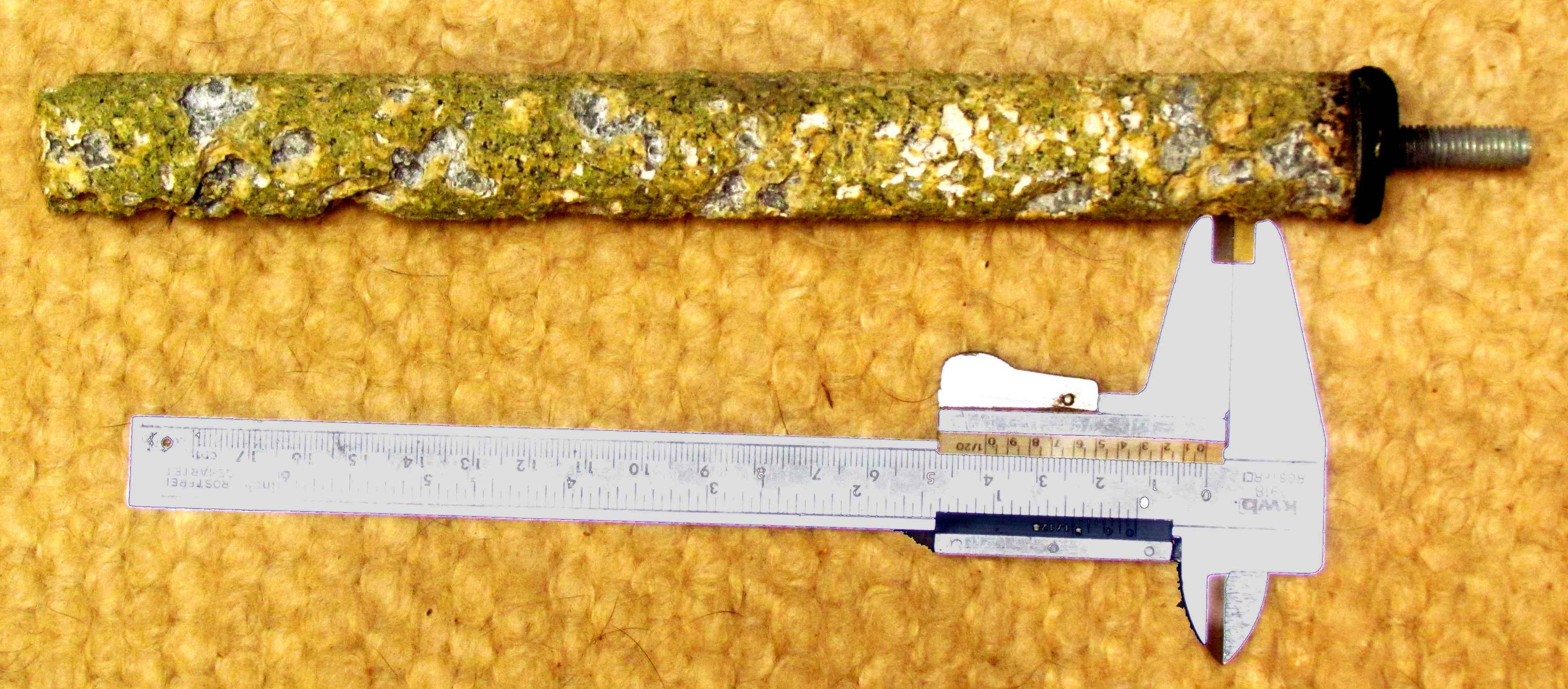 gebrauchte Magnesiumanode für kathodische Korrosionsschutzanlage mit Maßstab